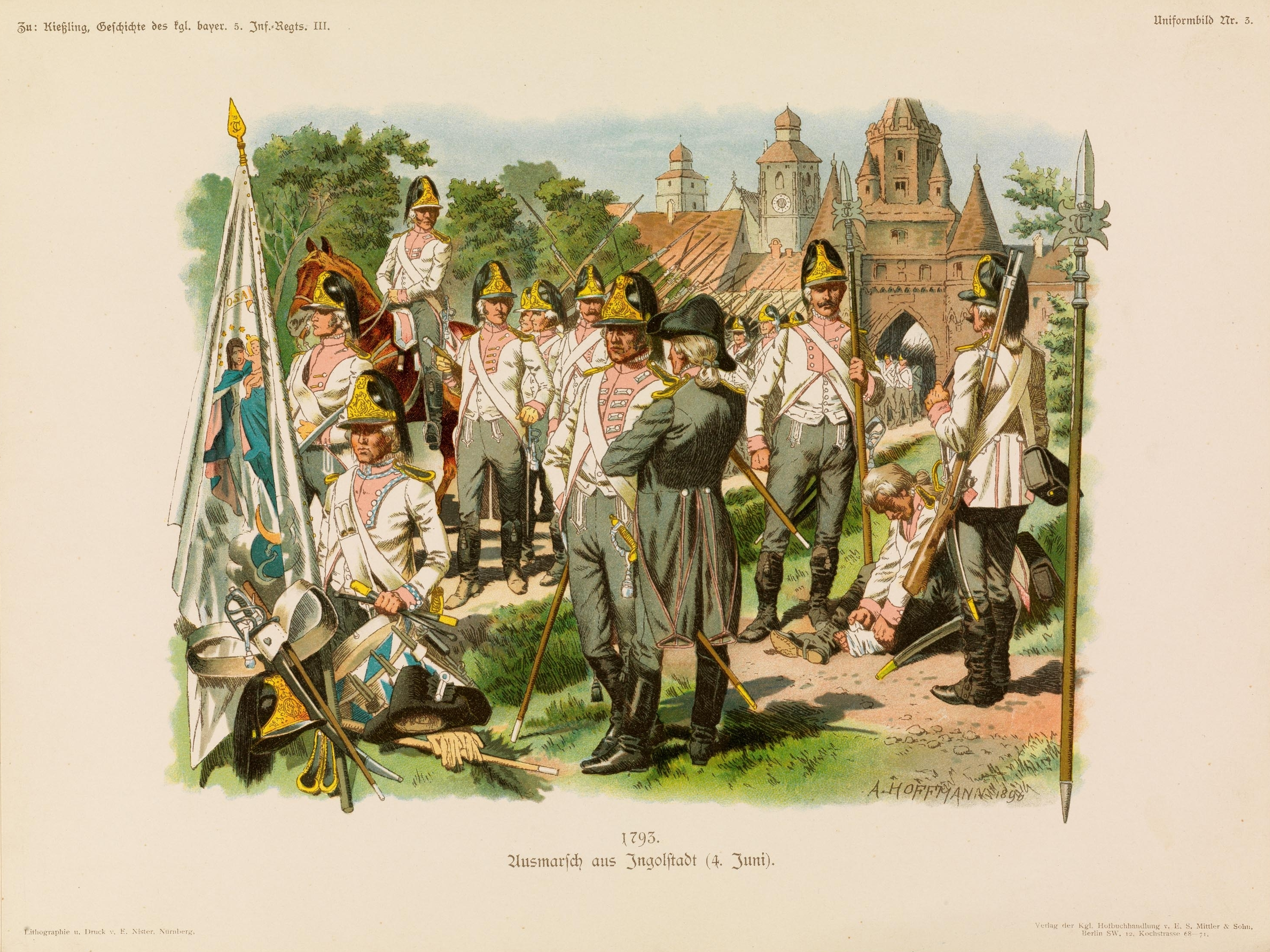 Uniform-Bilder zur Geschichte des Königl. Bayer. 5. Infanterie-Regiements Grossherzog Ernst Ludwig von Hessen. Lithographie und Druck v. E. Nister, Nürnberg. Verlag der Kgl. Hofbuchhandlung v. E. S. Mittler & Sohn, Berlin.